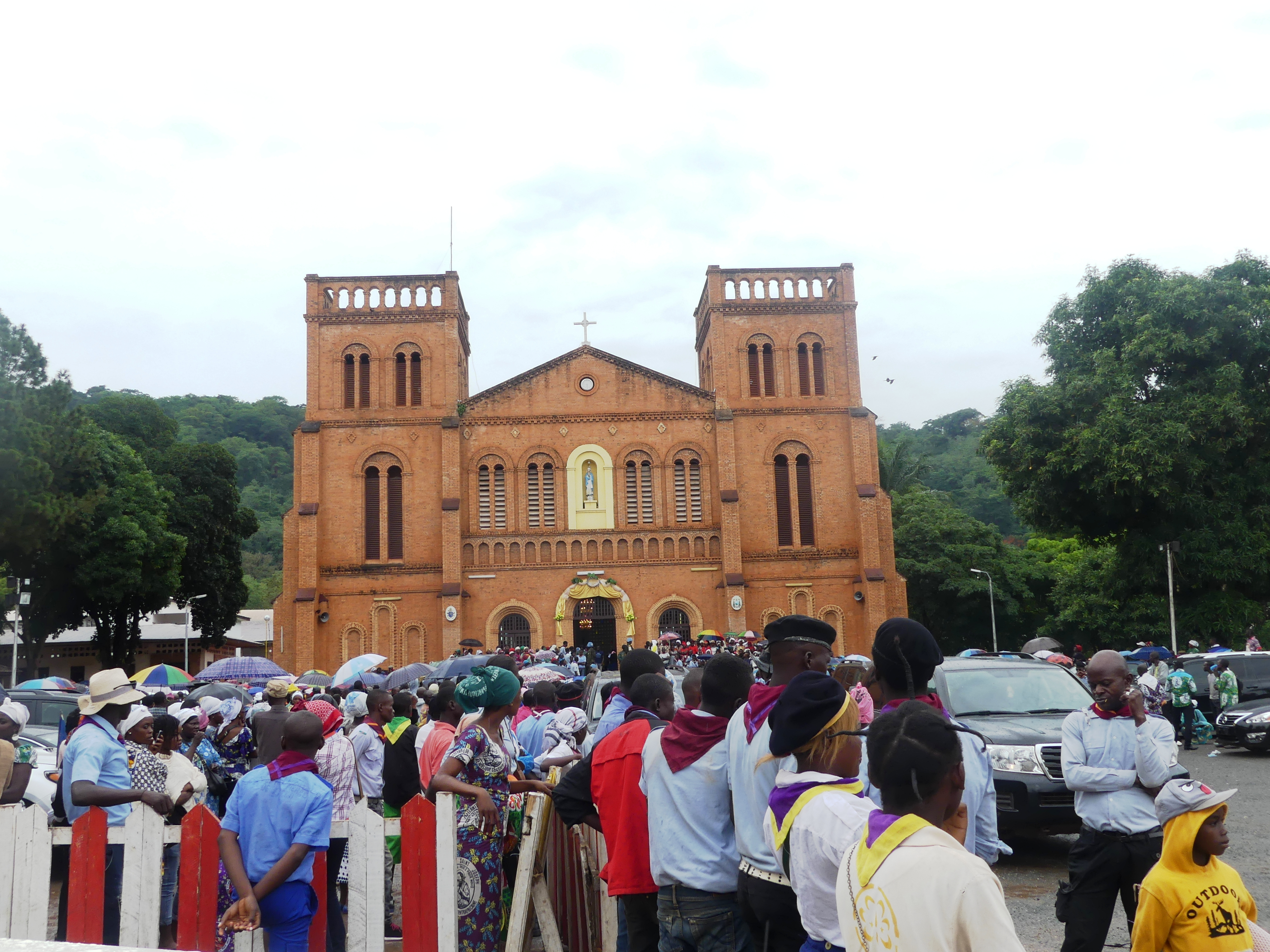 Une foule devant la Cathédrale de Bangui, le 7 mai 2018. (VOA/Freeman Sipila) En RCA, dernier hommage lundi [7 mai] matin aux victimes de l'attaque du 1er mai contre l'Eglise Catholique de Fatima à Bangui. Alors que l'émotion était à son comble, certains quartiers de la capitale affectés hier par une nouvelle vague de violence continuent de se vider leurs habitants.